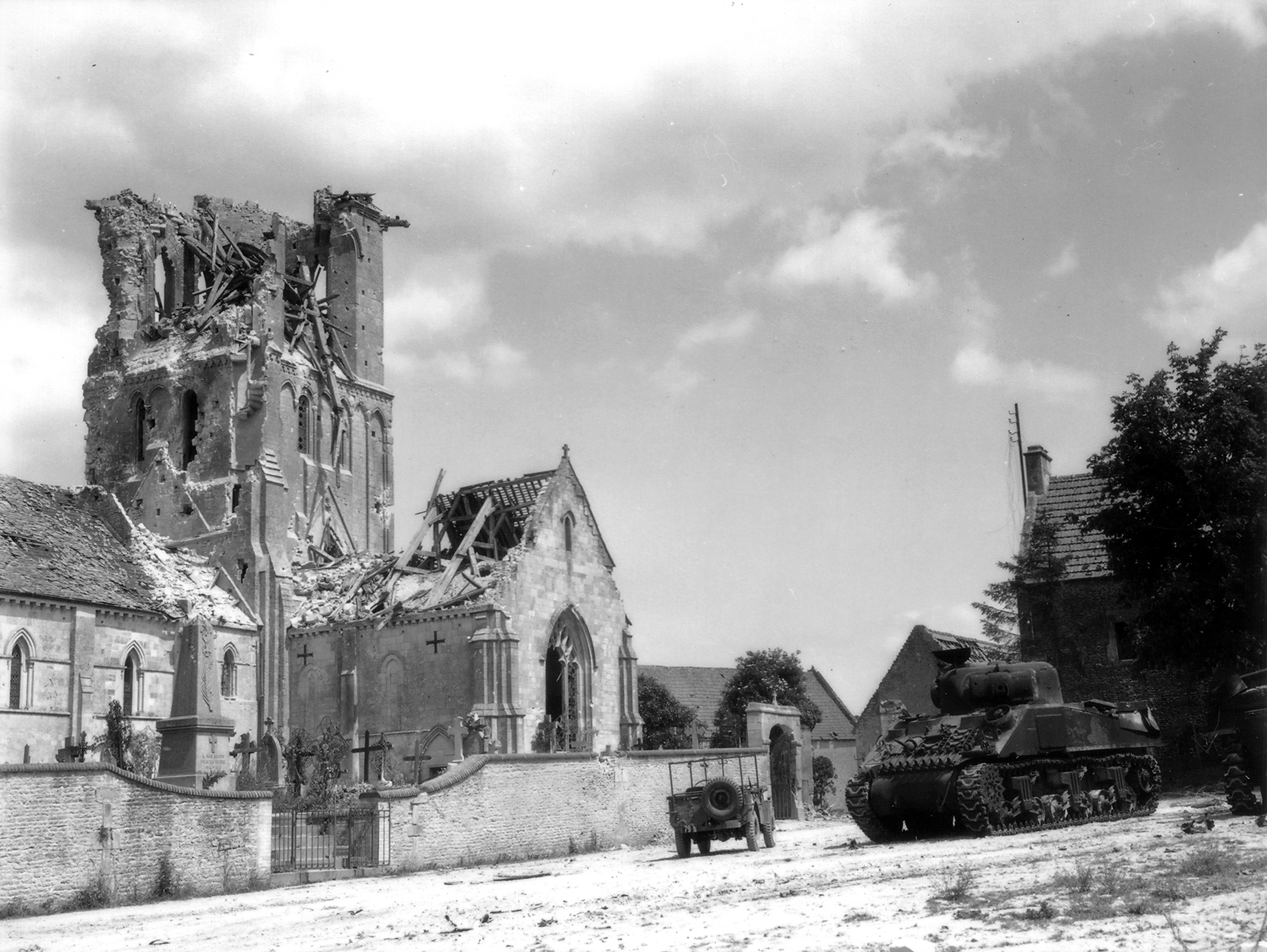 Un char Sherman ainsi qu'une Jeep stationnent près de l'église de Rots dont le clocher est totalement détruit.